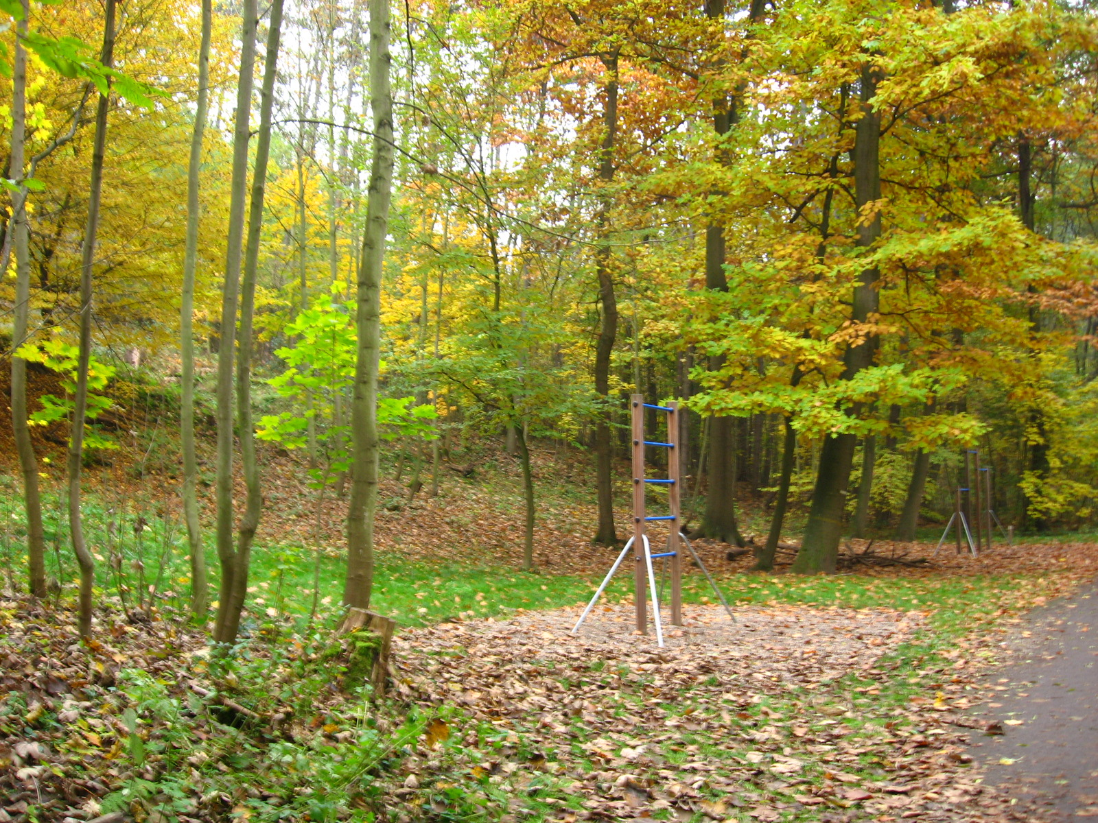 Jeden z dětských plácků v Modřanské rokli